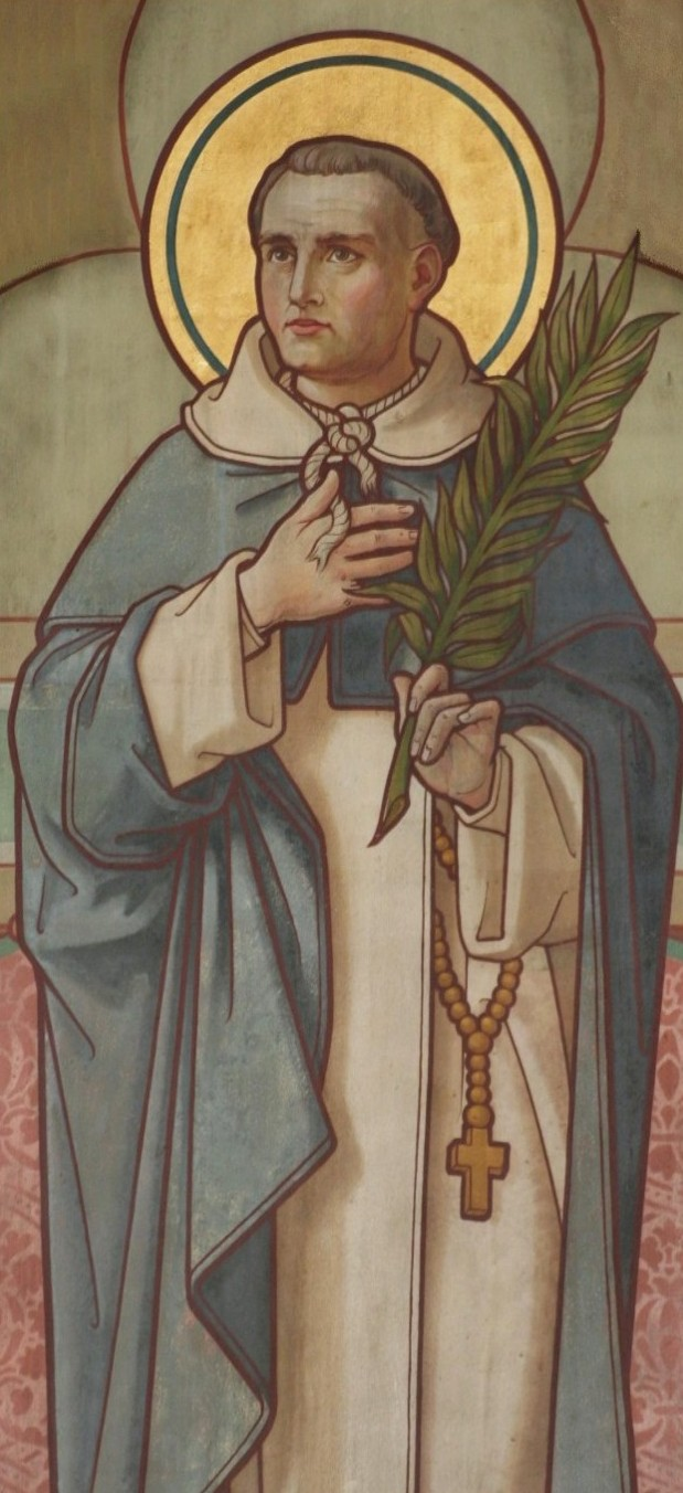 St. Johannes van Hoornaar, martelaar van Gorcum